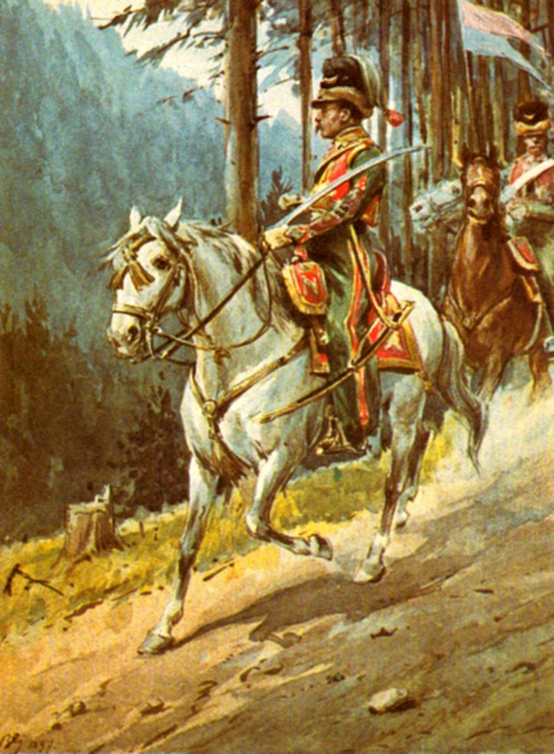 Des Tartares lituaniens de la Garde impériale. Cet escadron participa aux campagnes de Russie, d'Allemagne et de France avant d'être dissous à la Première Restauration.